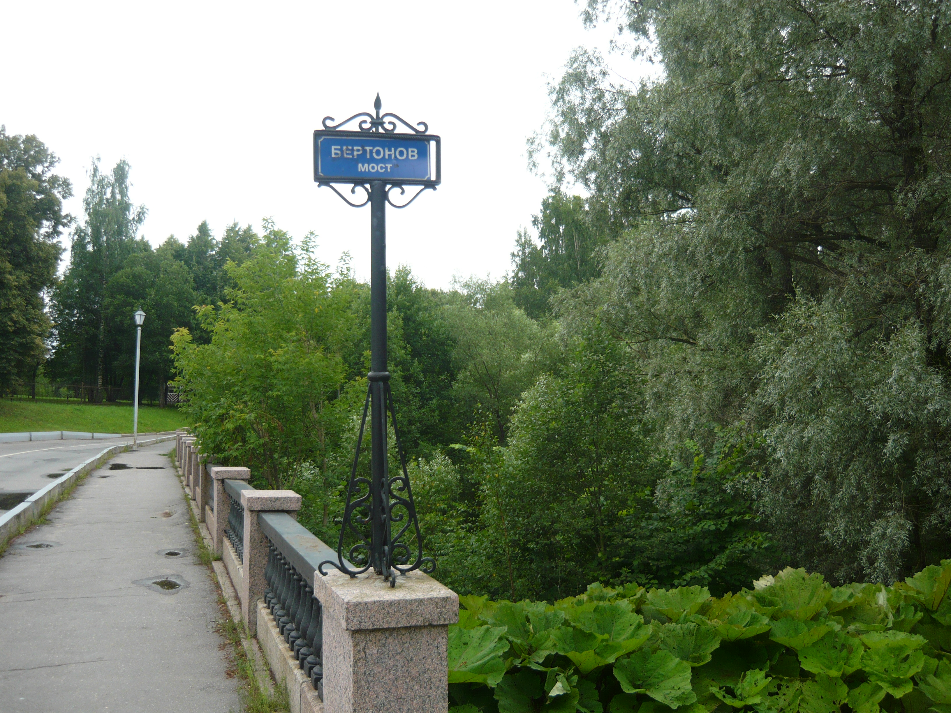 Бертонов мост - мост через реку Тызва (приток Славянки)